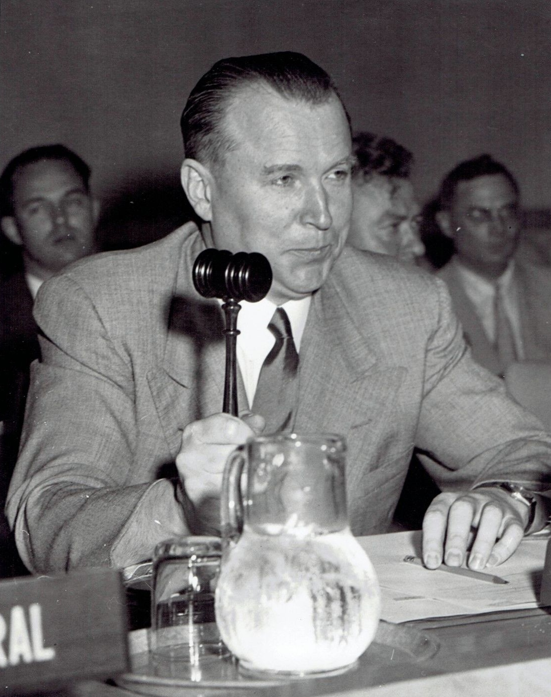 1952 Original Photo by ARTHUR SASSE Soviet diplomat Yakov Malik at UN meeting